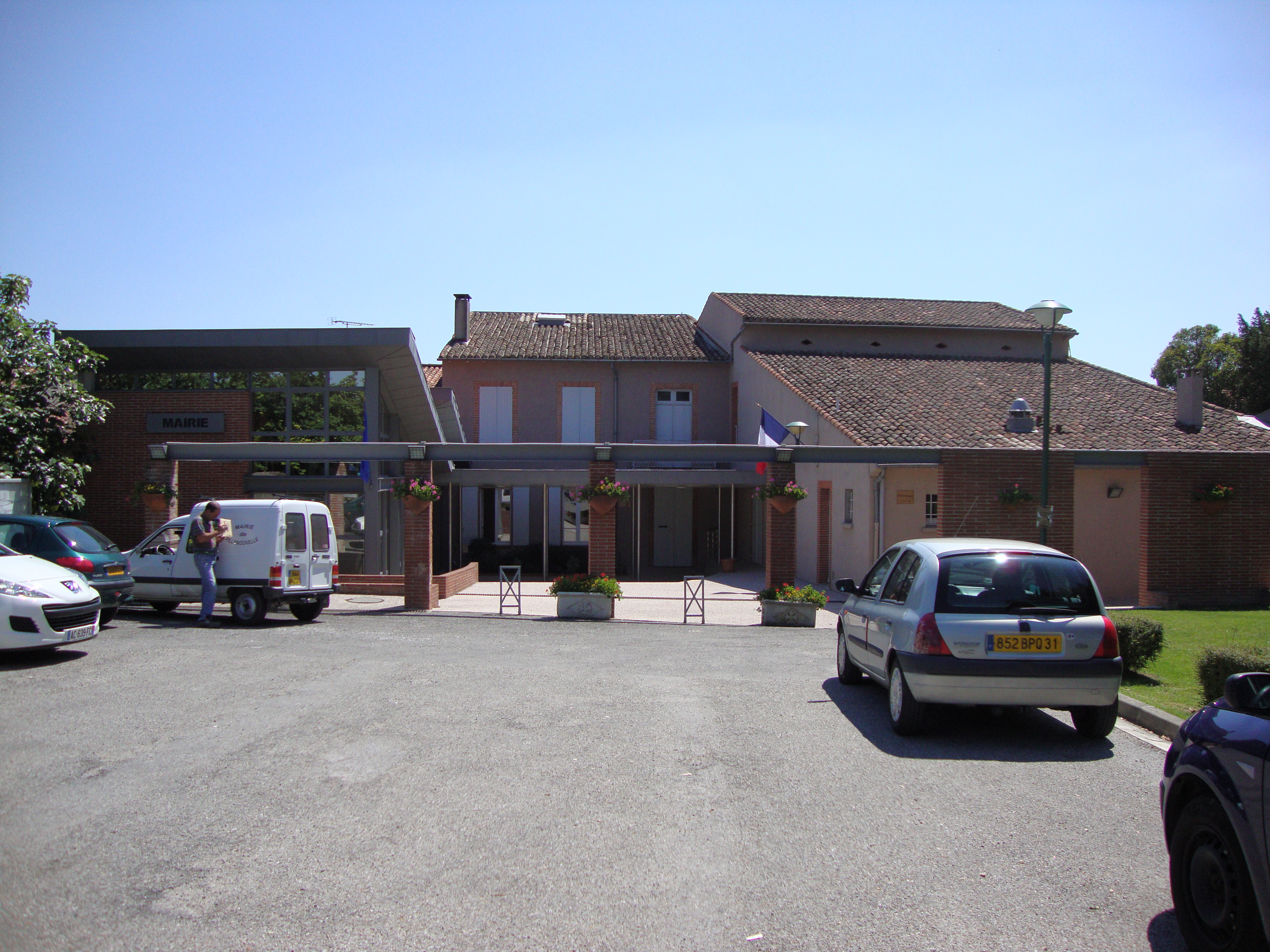 Villenouvelle (Haute-Garonne, Fr) mairie